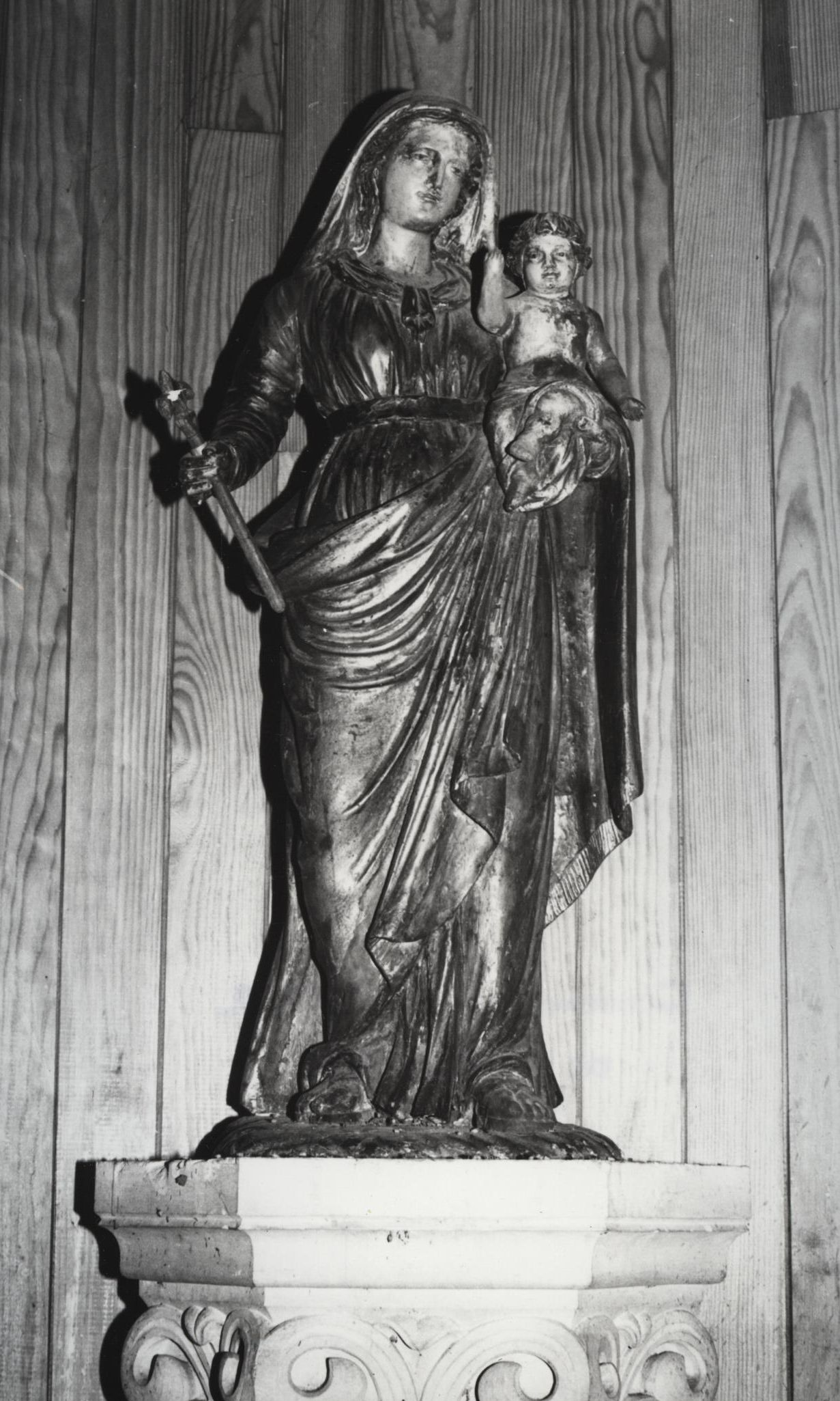 Skulptur Madonna mit Kind in der Kirche Saint-Cyr-Sainte-Juliette in Diou (Allier)